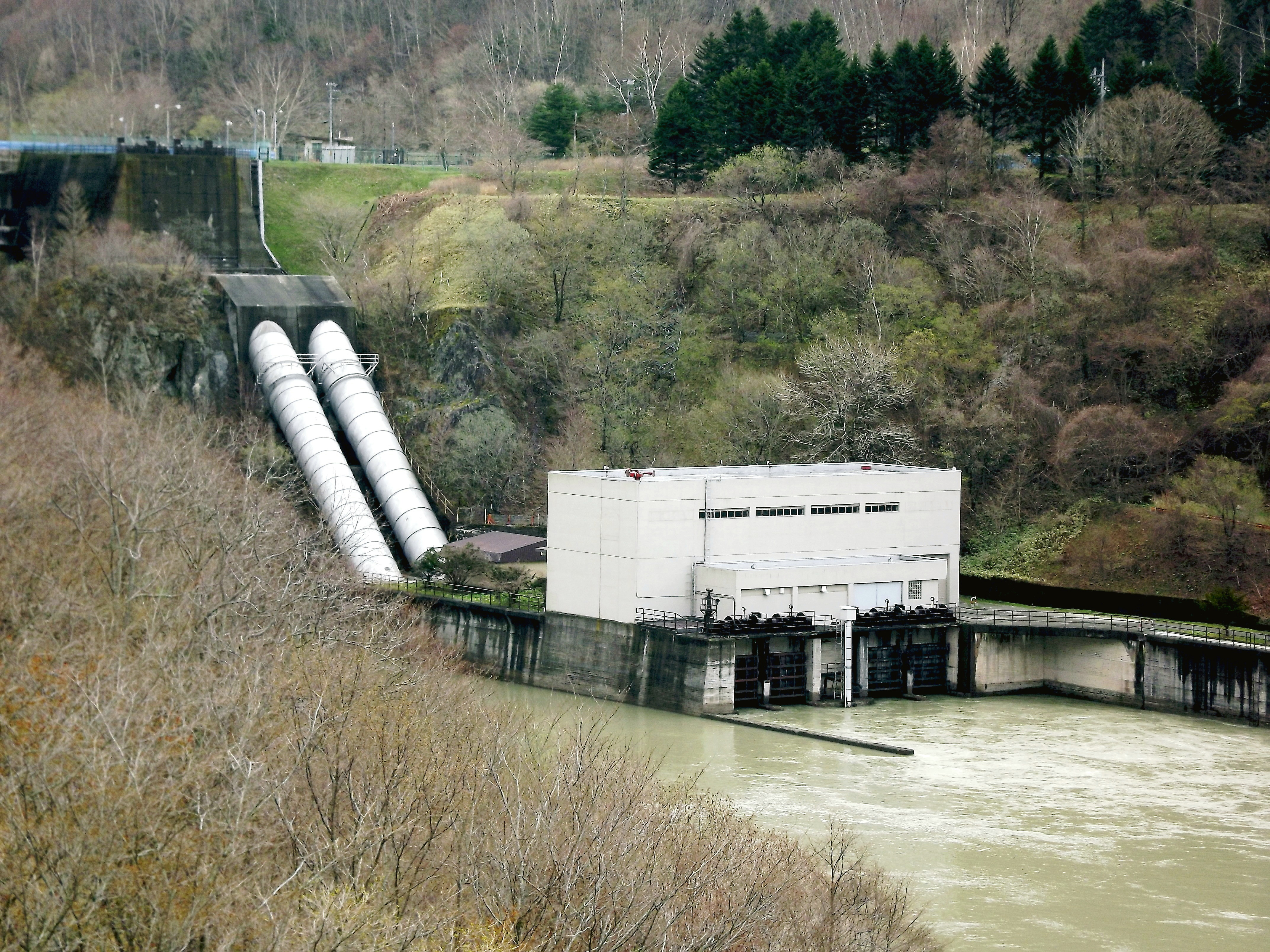 北海道電力静内発電所（北海道日高郡新ひだか町）